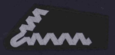 patki podoficera ZS"S" RP